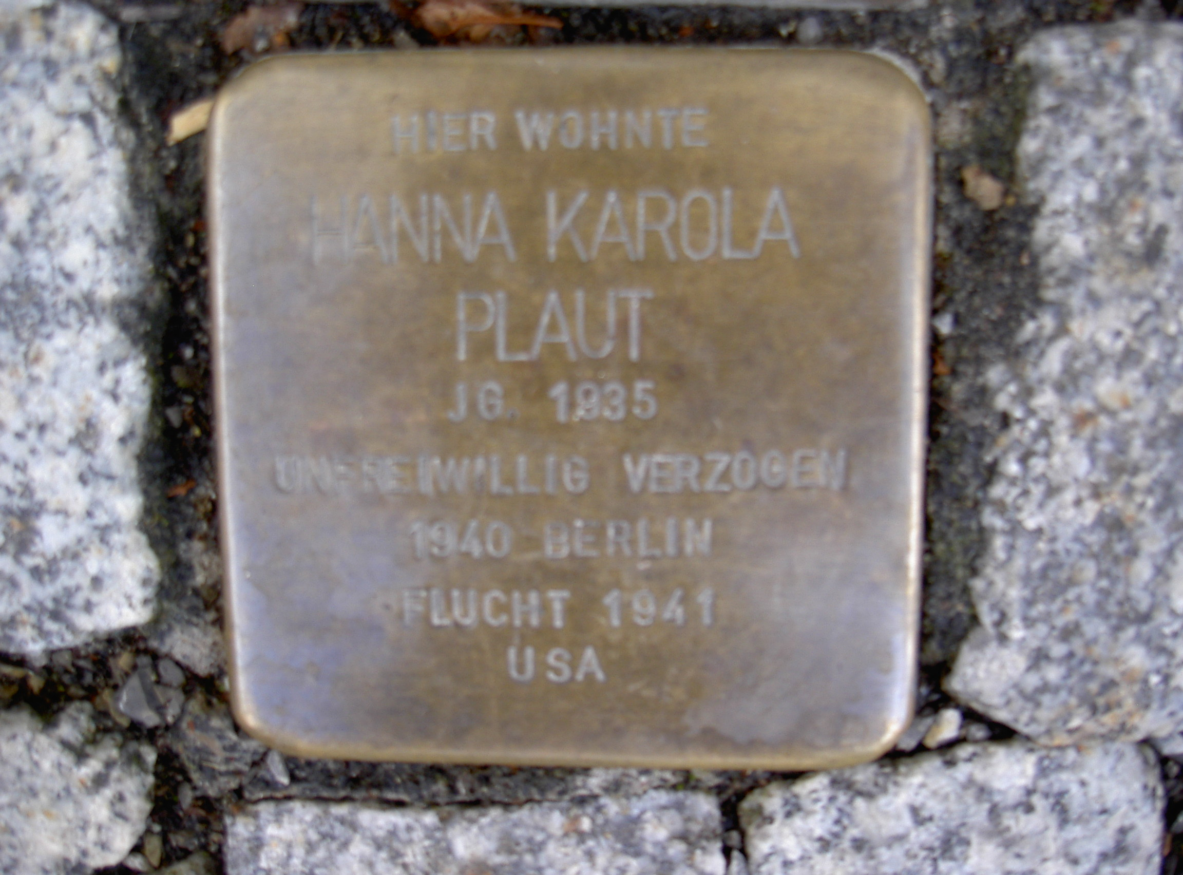 Stolperstein in Themar Markt 8 Plaut Hanna